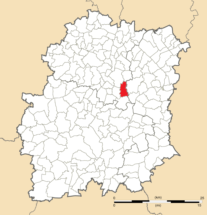 Carte de position de Leudeville en Essonne (91)